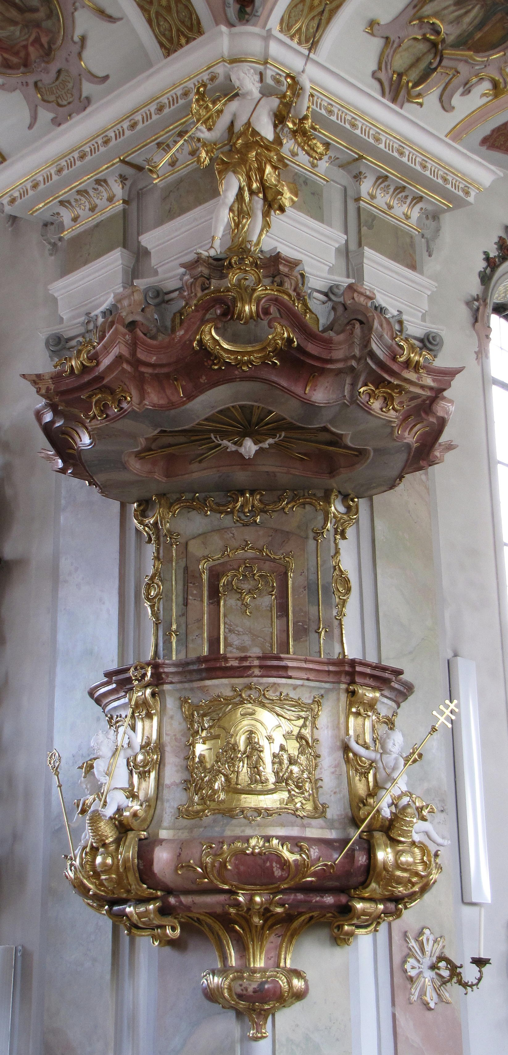 Kanzel in der Pfarrkirche Wiggensbach von Joseph Stapf, Pfronten, 1772